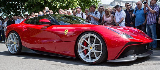 La Ferrari F12 TRS, one off basata sulla F12berlinetta di serie